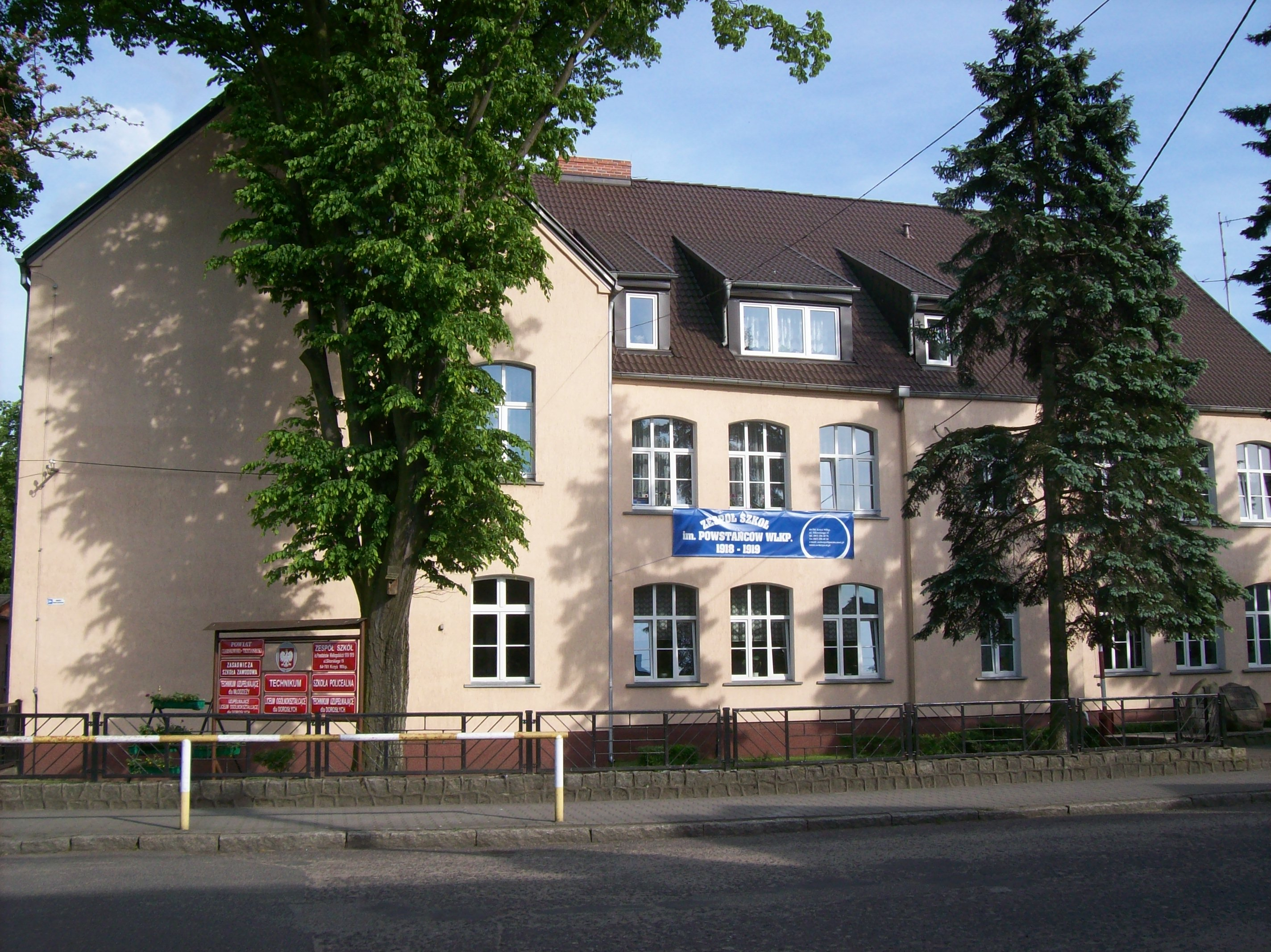 Zezpół Zrżkół w Krzyżu.